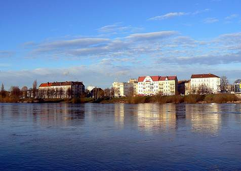 Widok na kamienice w Słubicach